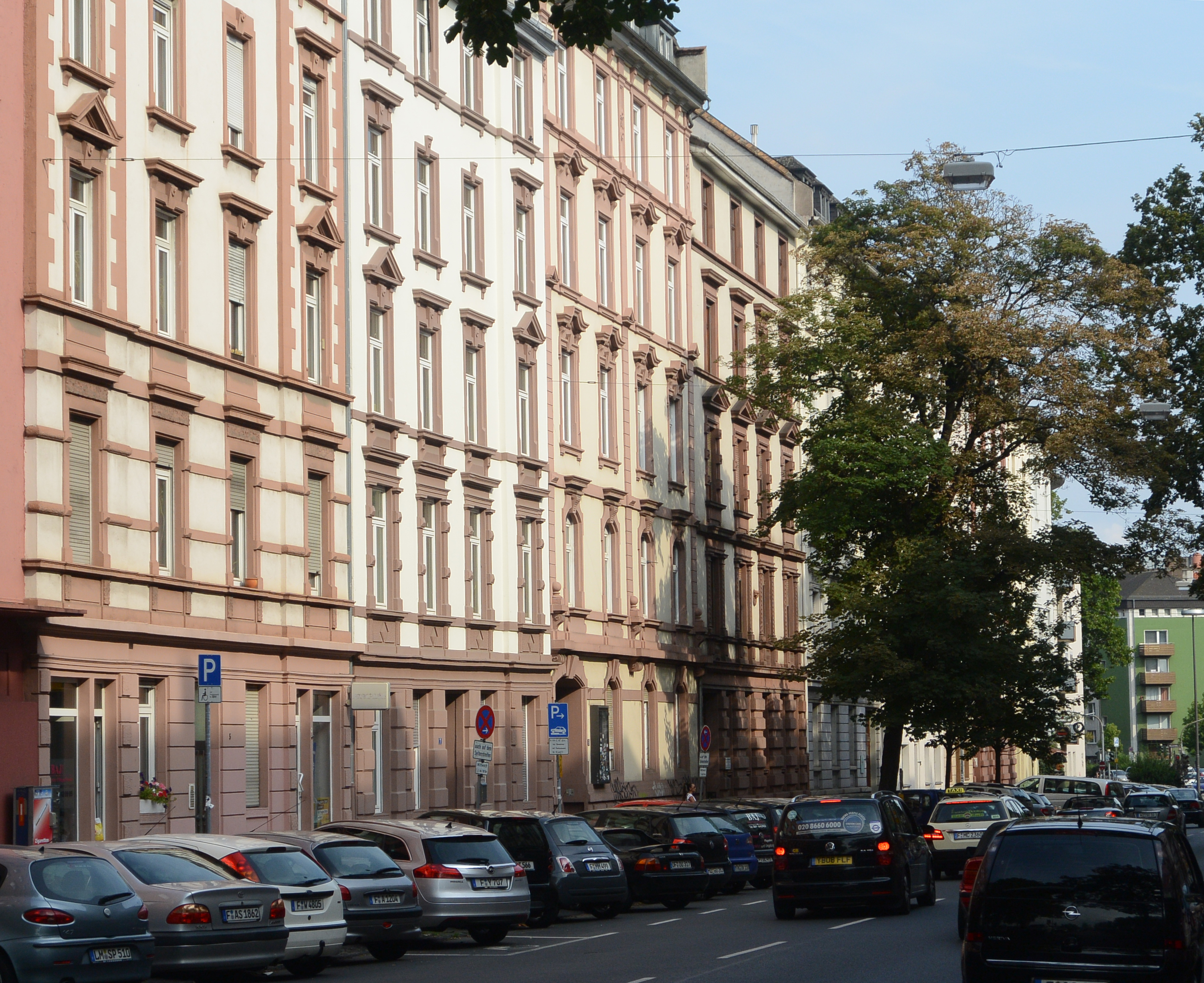 Gründerzeitliche Blockrandbebauung in Frankfurt-Sachenhausen, Seehofstraße